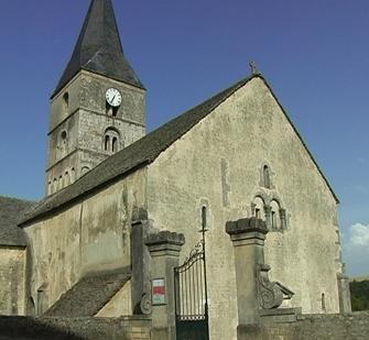 Bussy-le-Grand, Église Saint-Antonin (12e siècle)